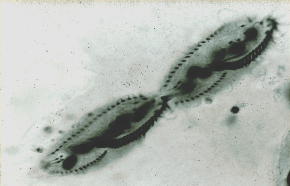 Querteilung beim Ciliaten Gonostomum affine